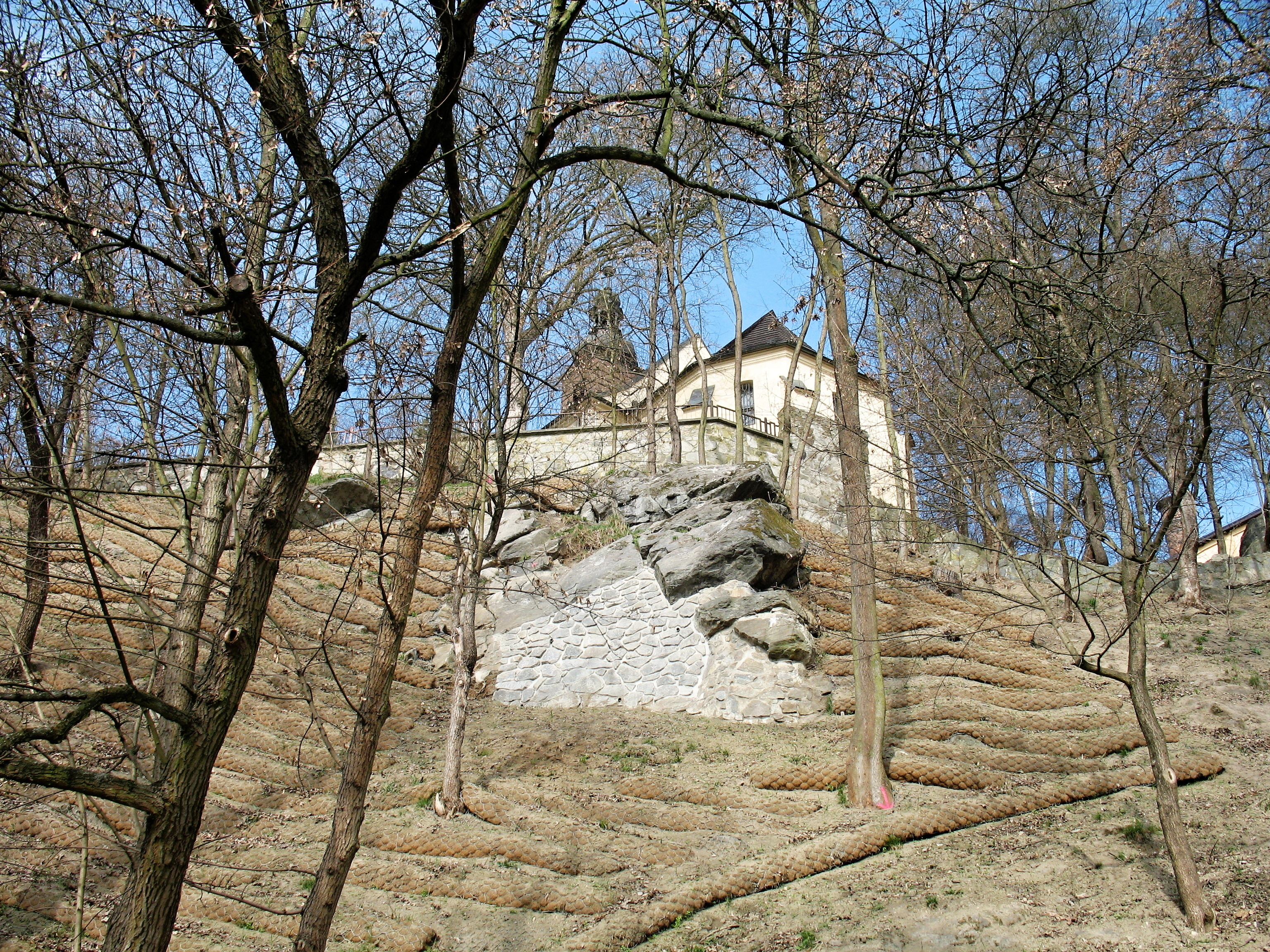 Granátová skála v Táboře (březen 2014)